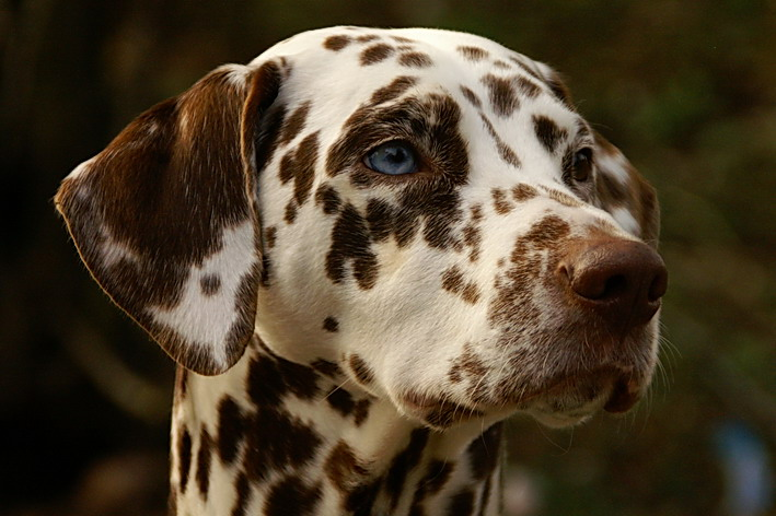 Dalmatiner mit Blauauge